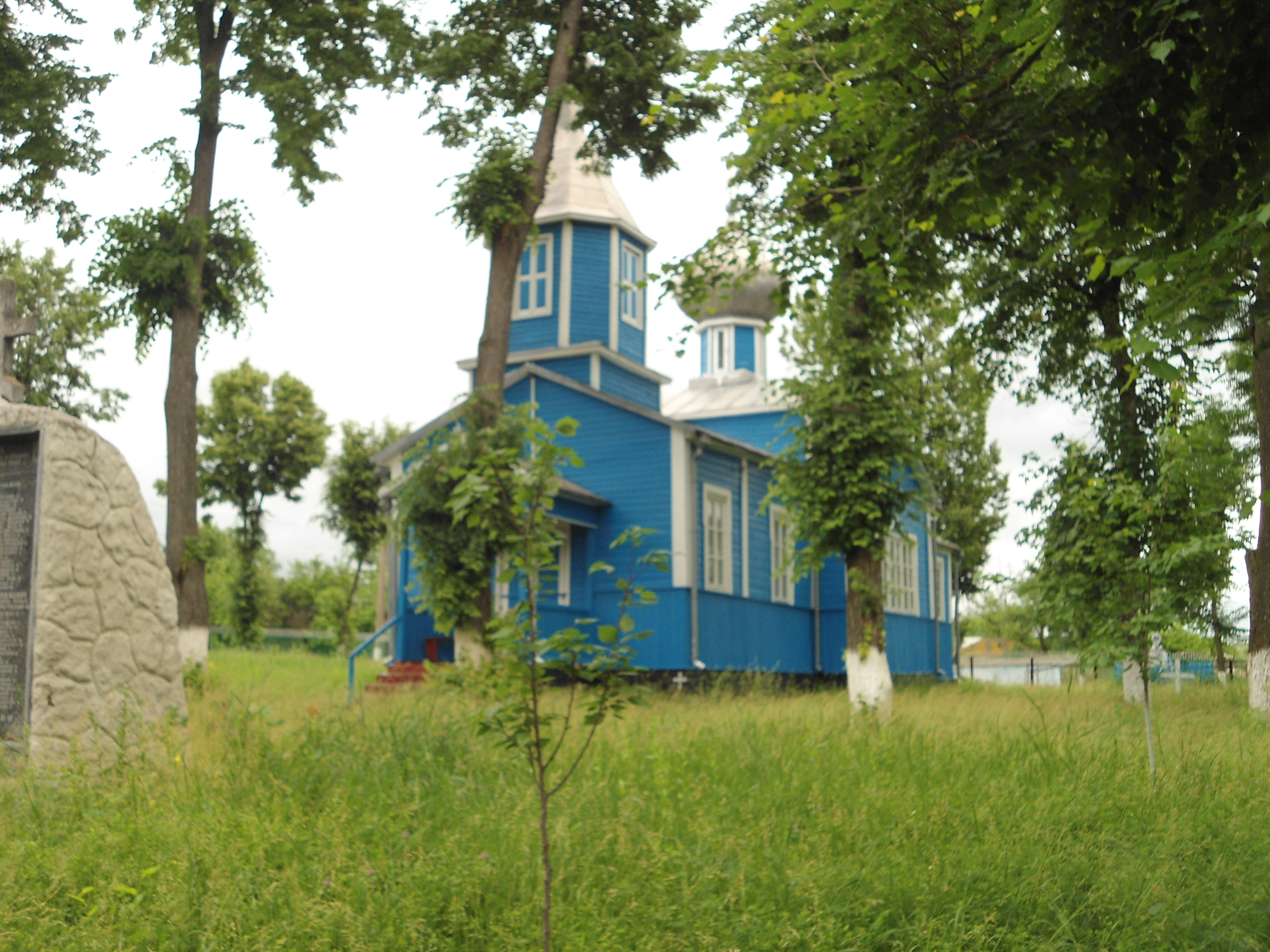 Церковь Покрова Божьей Матери село Мошана